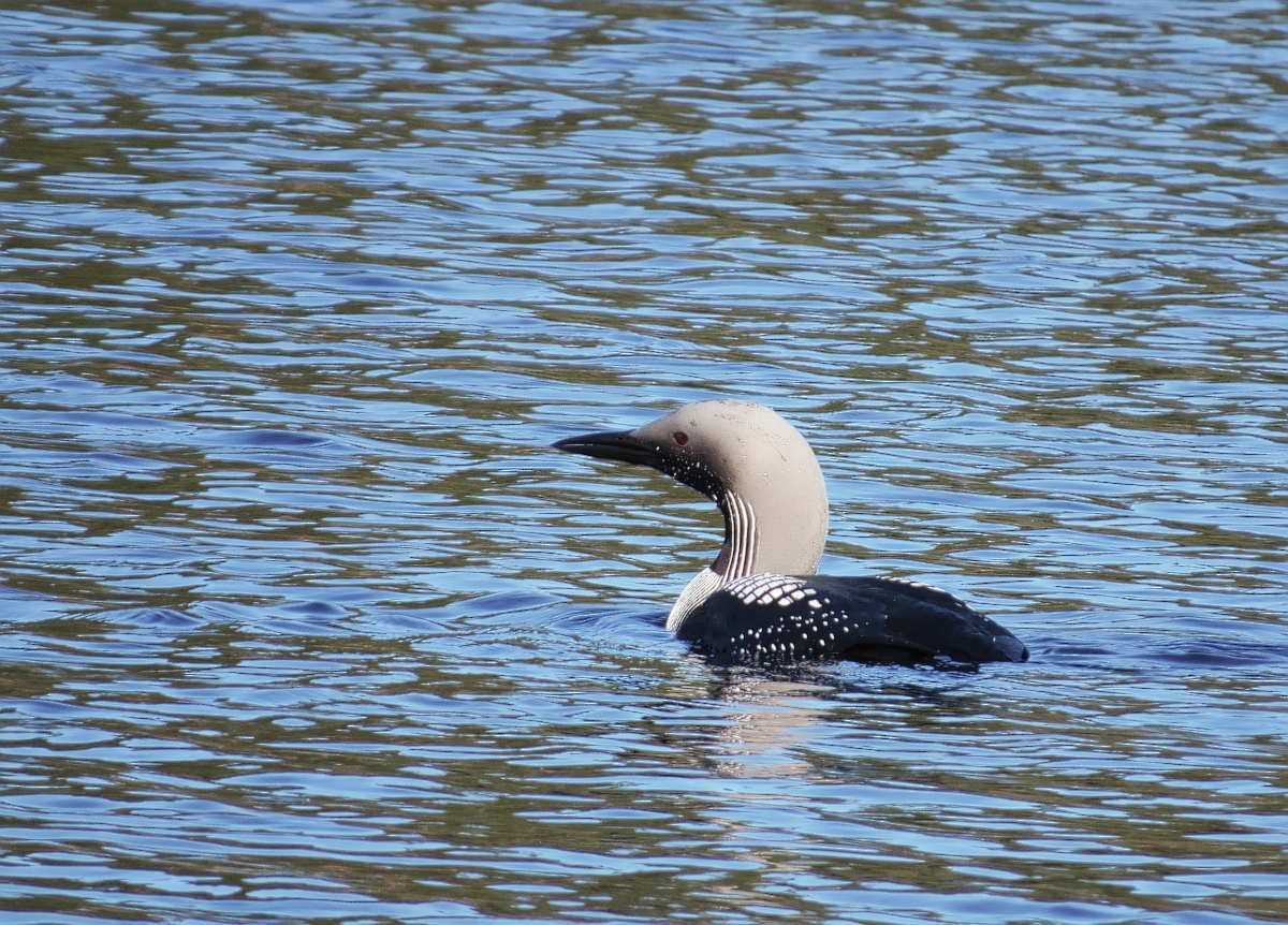 Scientific name: Gavia arctica Original file: IMG_1026.TIF-single-new